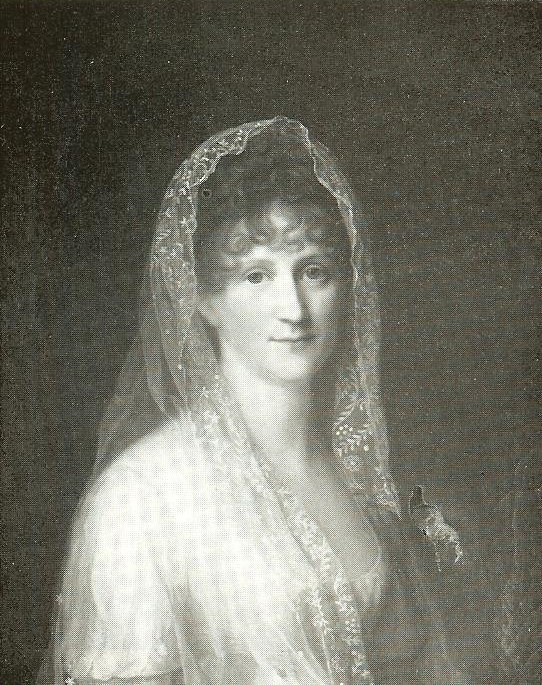 portrait of Emilie zu Rantzau-Rastorf, geb. Gräfin Bernstorff